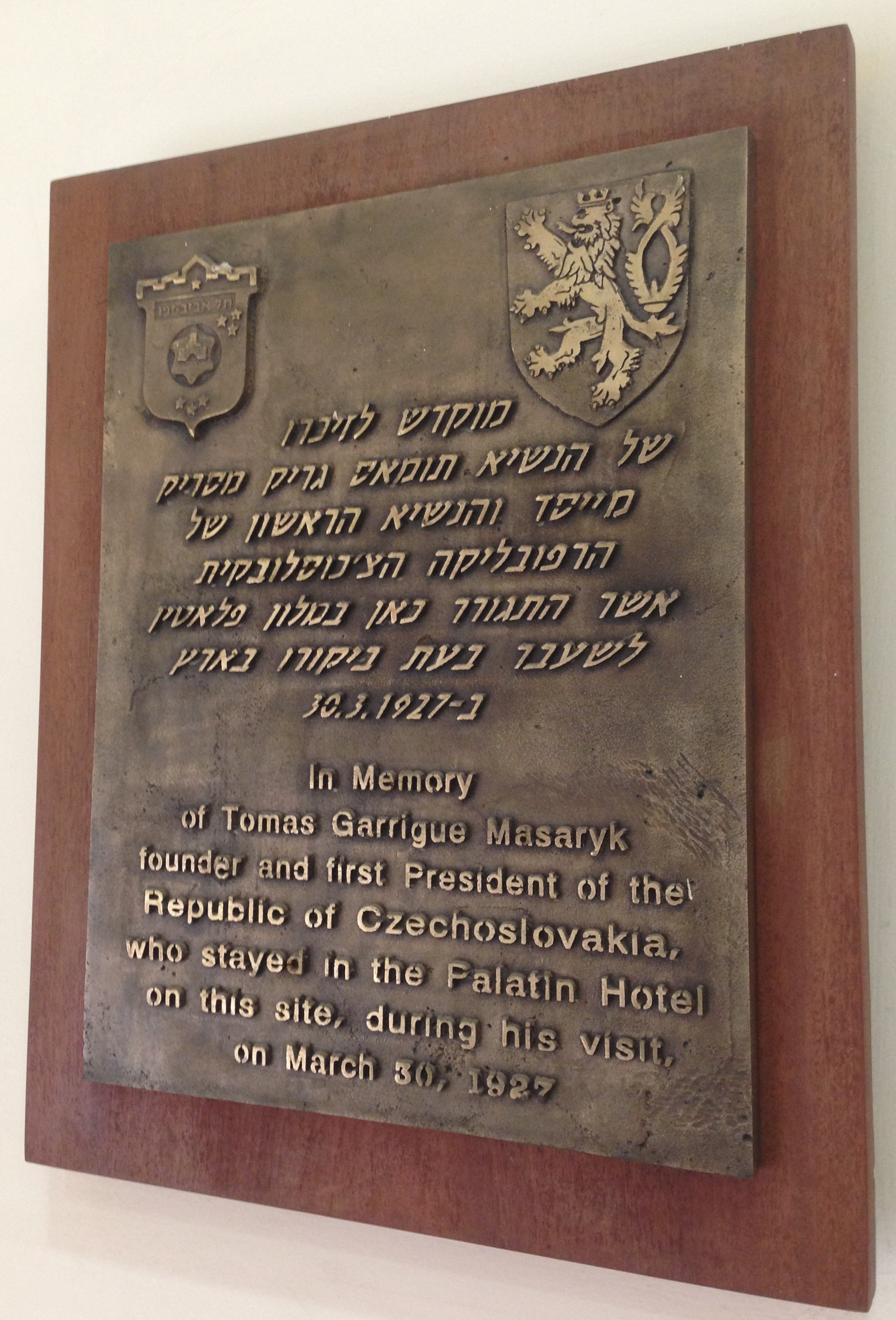 שלט במלון פלטין המוקדש לביקורו של נשיא צ'כוסלובקיה בשנת 1927